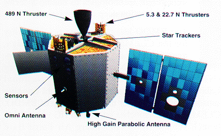 Klementino, lunsondilo de la Usona Nacia Aeronaŭtika kaj Kosma Administracio.